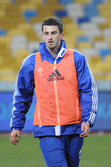 Janko Simović